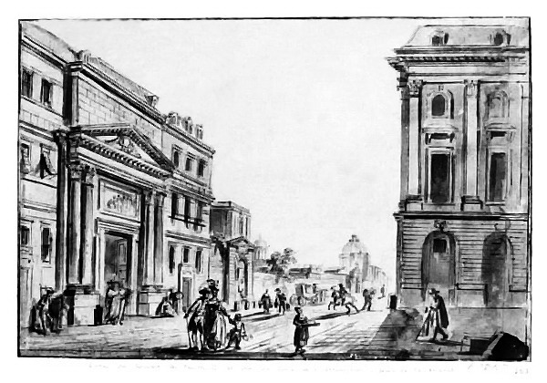 Rue saint-Honoré. A gauche, l'entrée des Feuillants, à droite la direction de la place Vendôme. Au fond le dome de l'Assomption